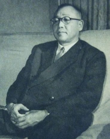 夏川嘉久次（近江絹糸紡績社長）